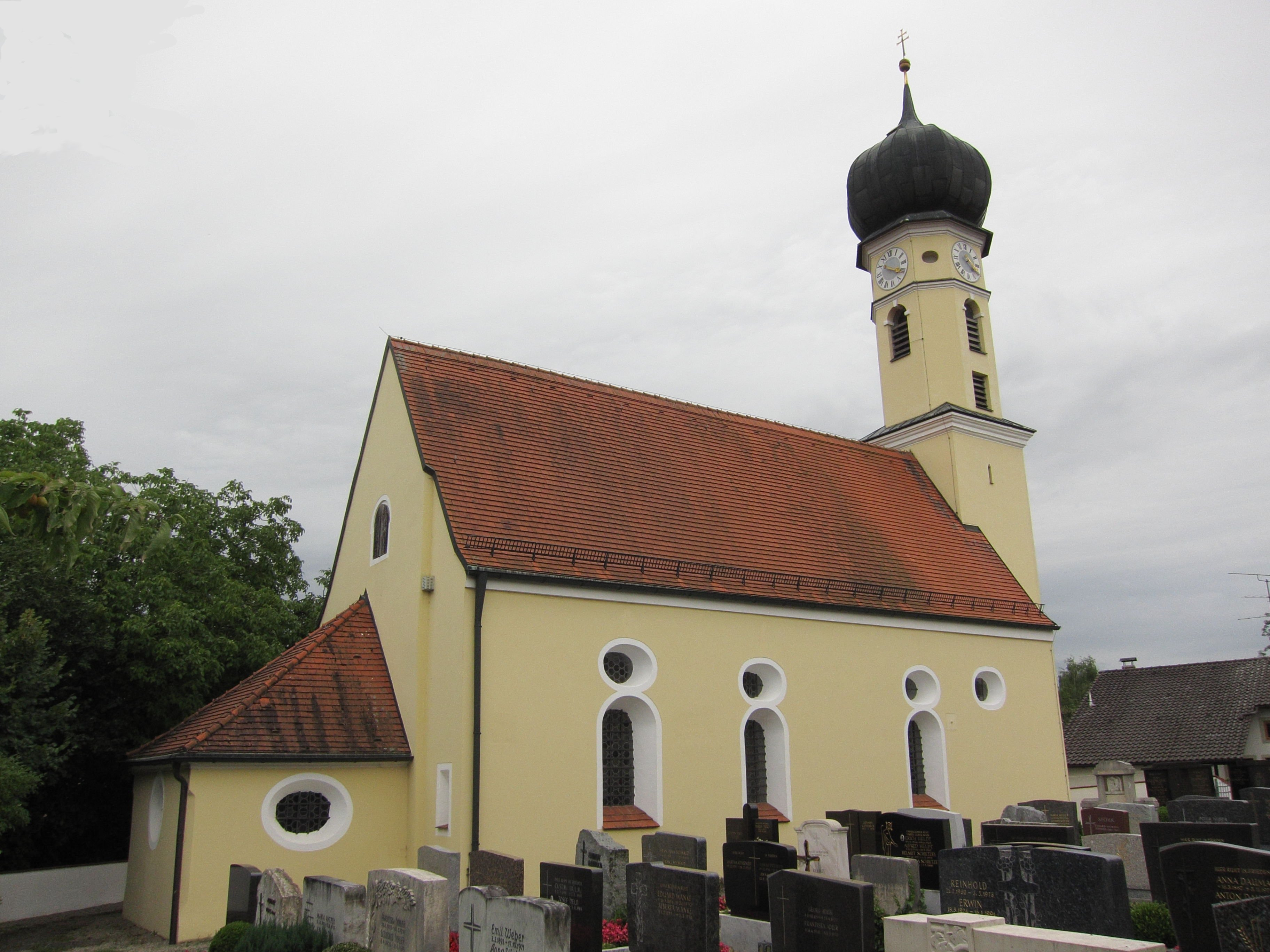 Katholische Filialkirche St. Katharina, Saalbau mit Zwiebelturm, Langhaus im Kern romanisch, wesentlich umgebaut und barockisiert um 1700; mit Ausstattung.